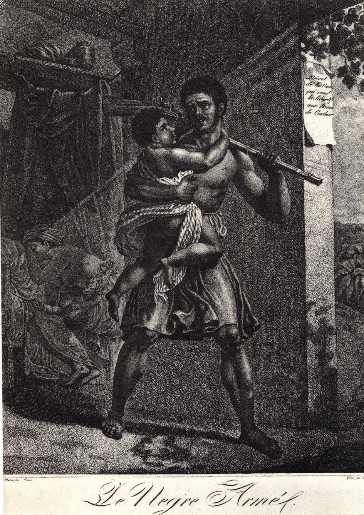 Image de la Révolution à la Guadeloupe. Le texte du placard sur le mur est : Décret de la Convention qui rend la liberté aux hommes de couleur.